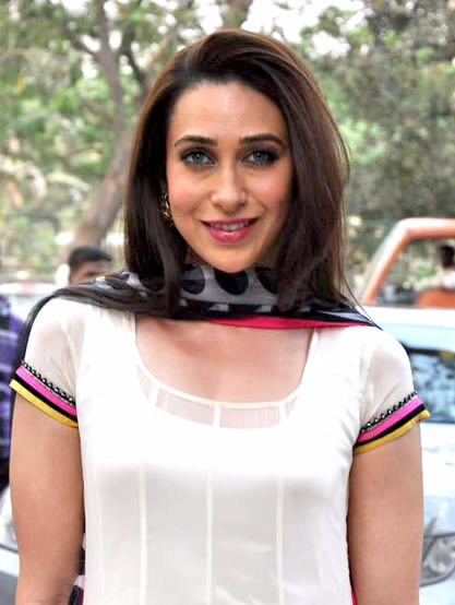 Karisma Kapoor at designer Archana Kochhar's store